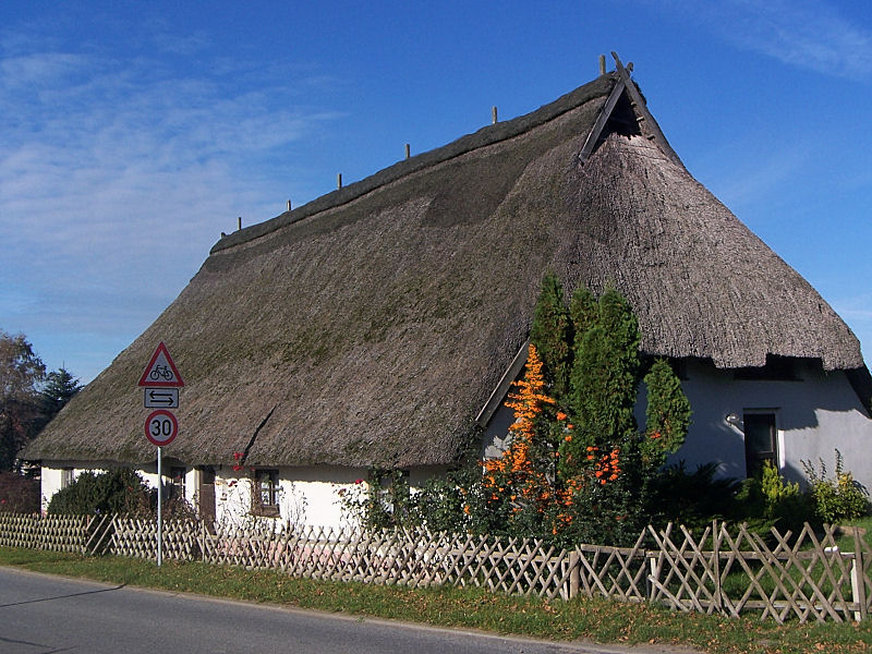 historisches Bauernhaus in Pepelow